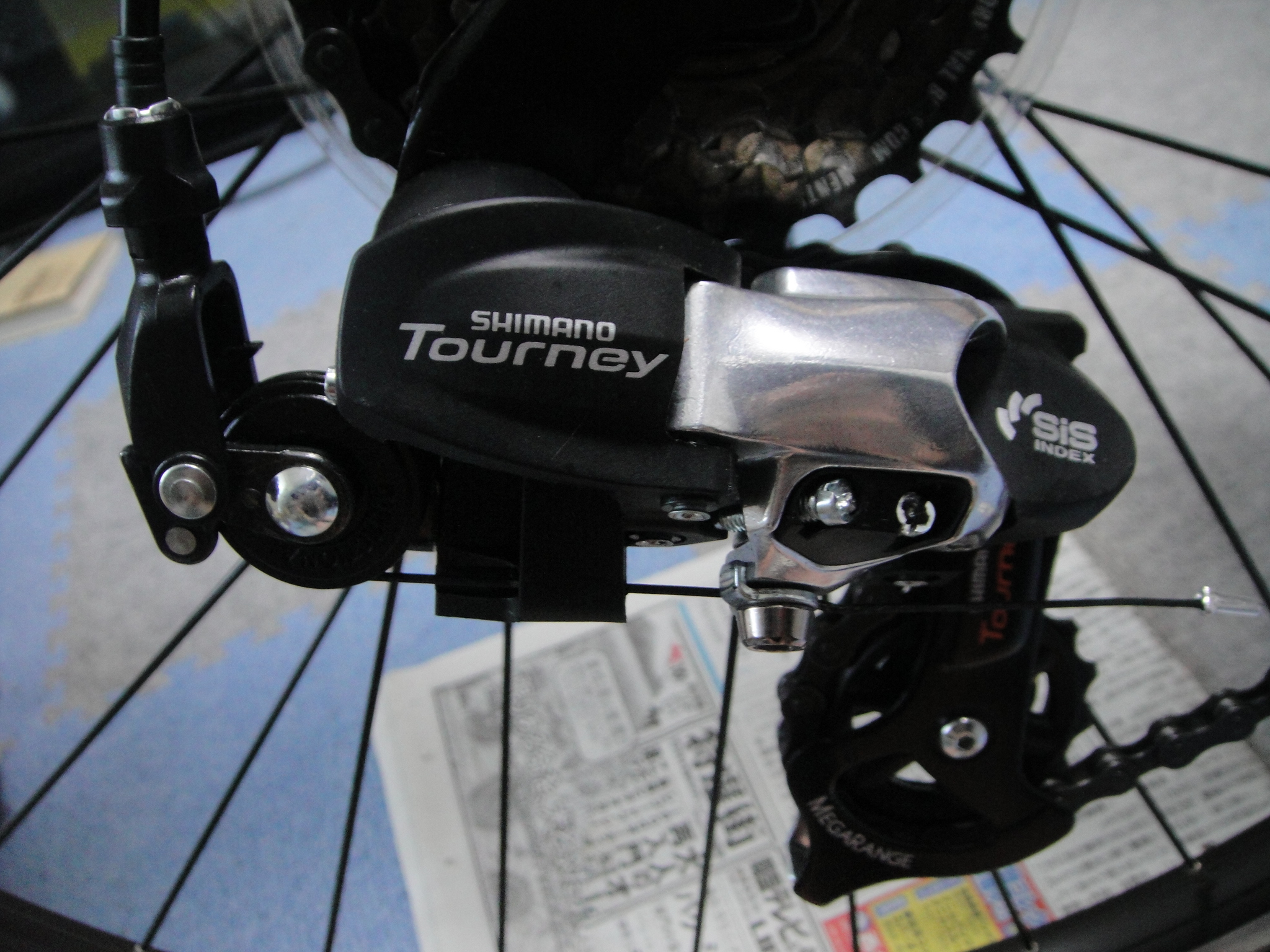 SHIMANOのリアディレイラー『TX-71』